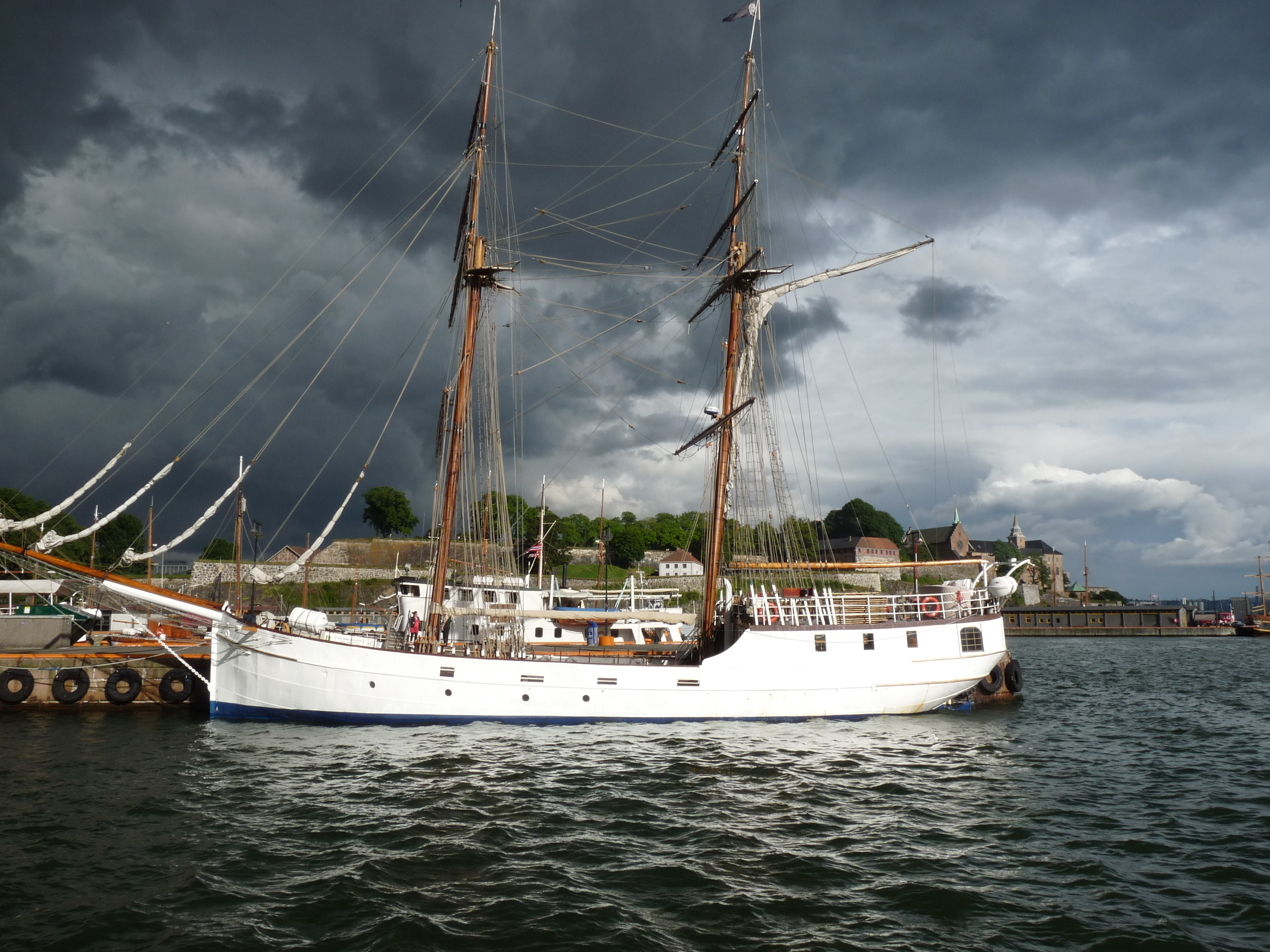 De SV-Legend brig schip aangemeerd in Oslo. SV-Legend